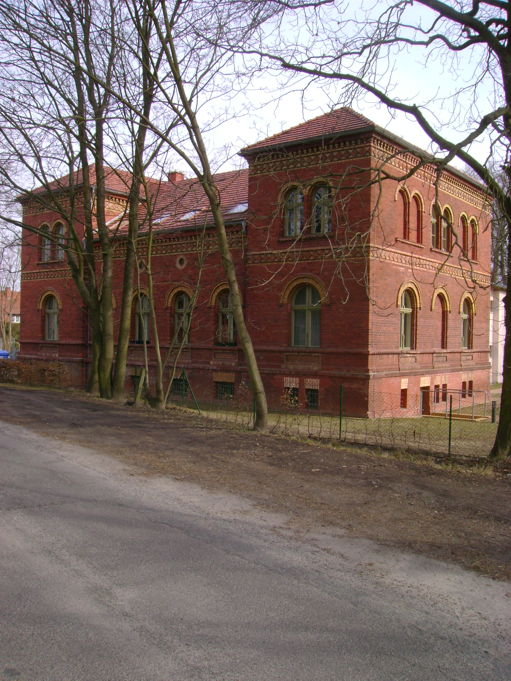 Denkmalgeschütztes Wohnhaus in Velten Bötzower Straße 105. (Rote Villa)